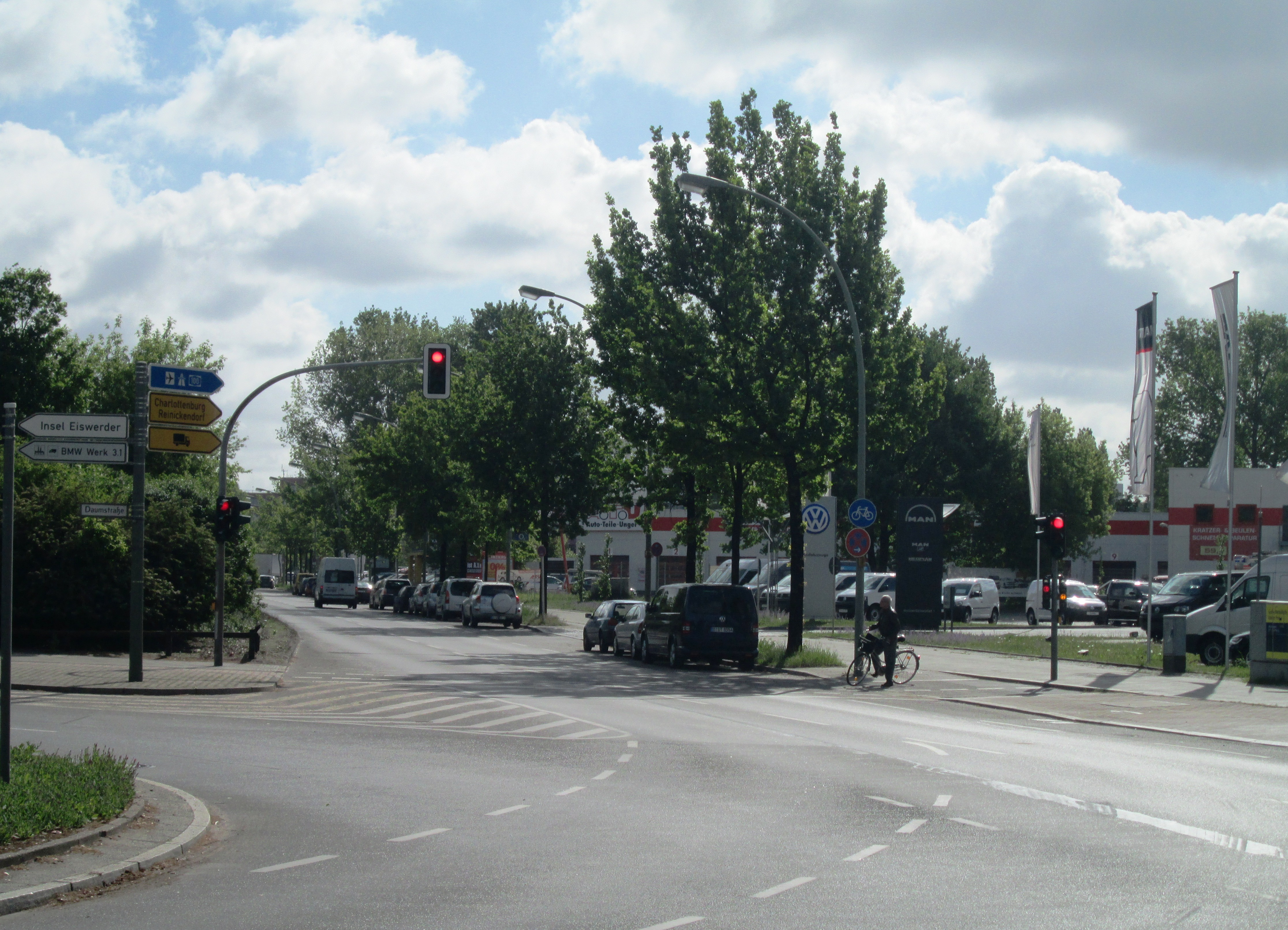 Straße "Nonnendammallee", Berlin-Spandau, OT Hakenfelde, Richtungsfahrbahn Ost ab Abzweigung Daumstraße